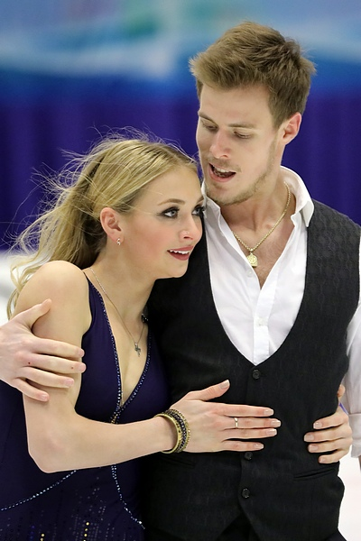 Виктория Синицина и Никита Кацалапов на этапе Гран-при NHK Trophy 2016